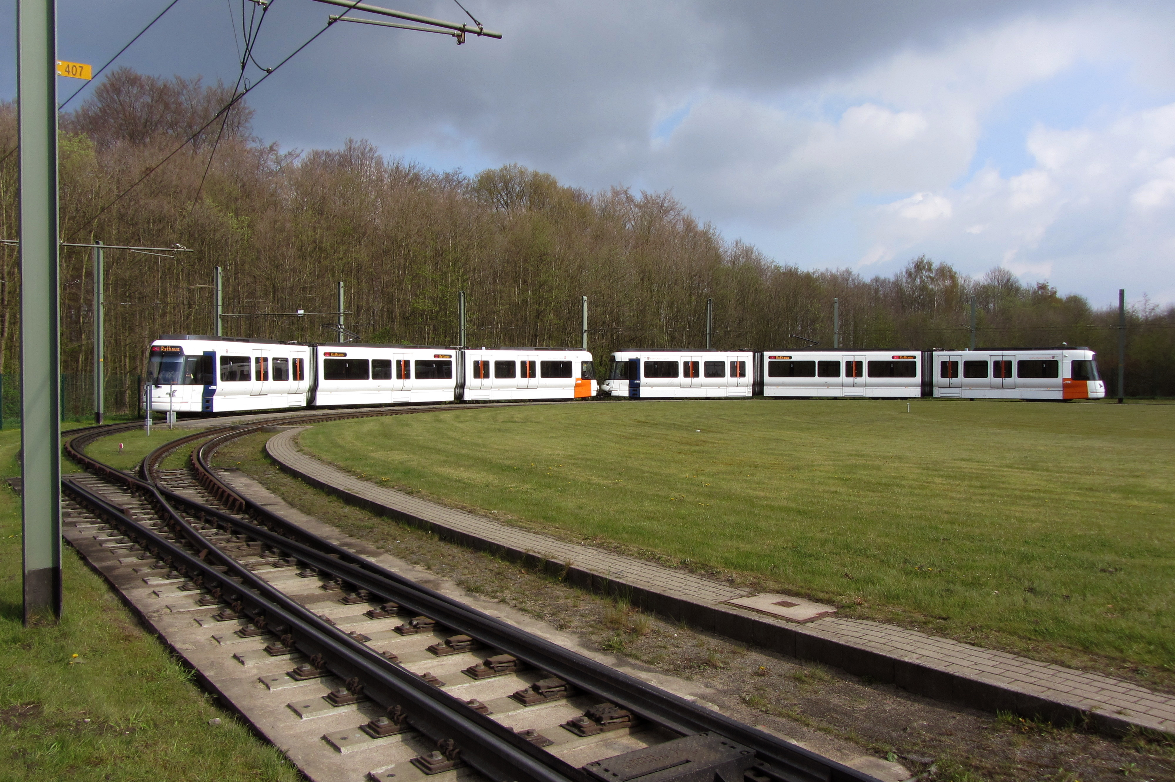 Bielefeld. Stadtbahn "Vamos" an der Endhaltestelle Lohmannshof, Wendeschleife.